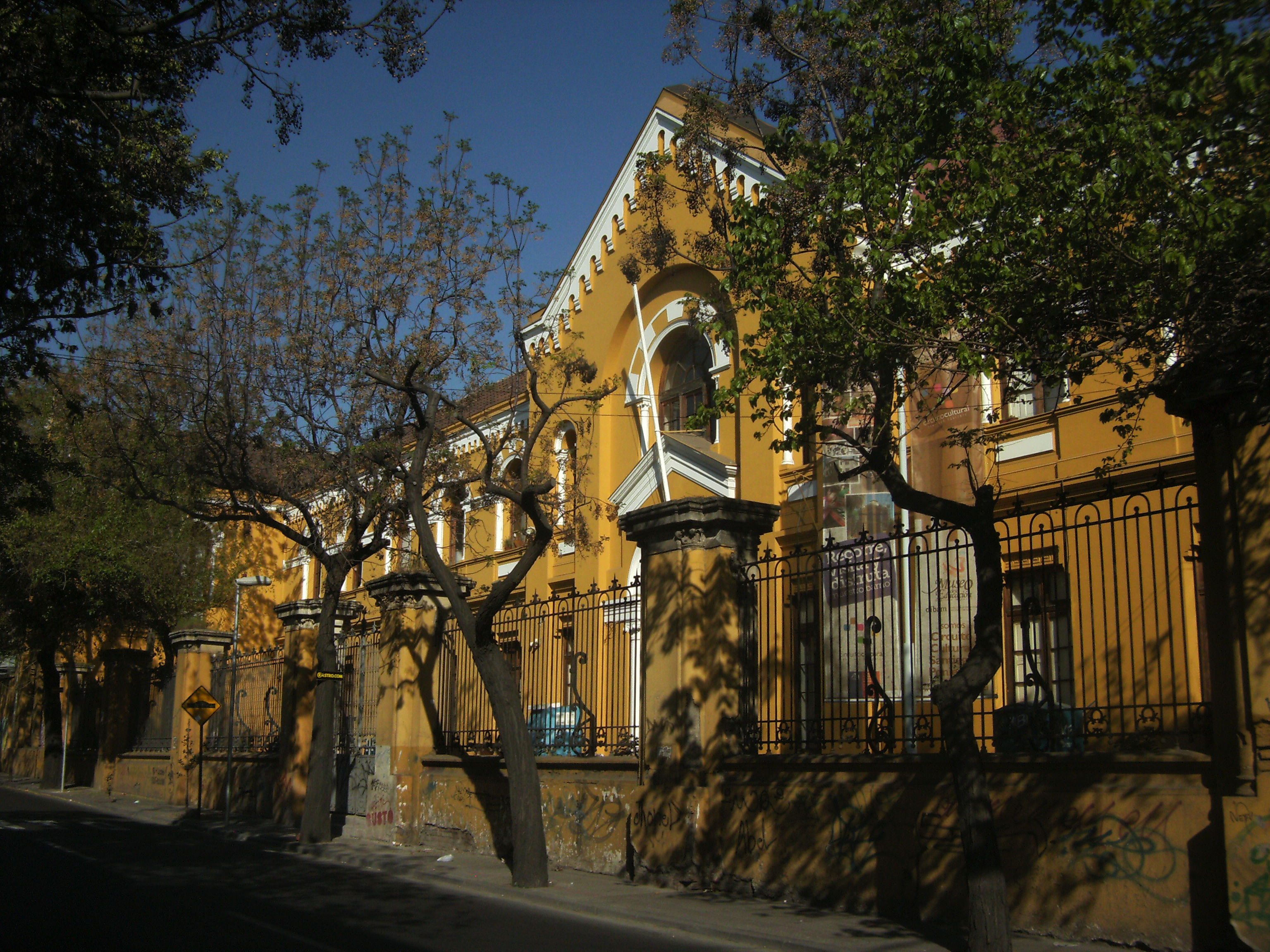 Sede de la ex- Escuela Normal Nº 1 This is a photo of a national monument in Chile: 839